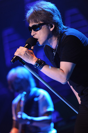 浜田省吾 (2011)